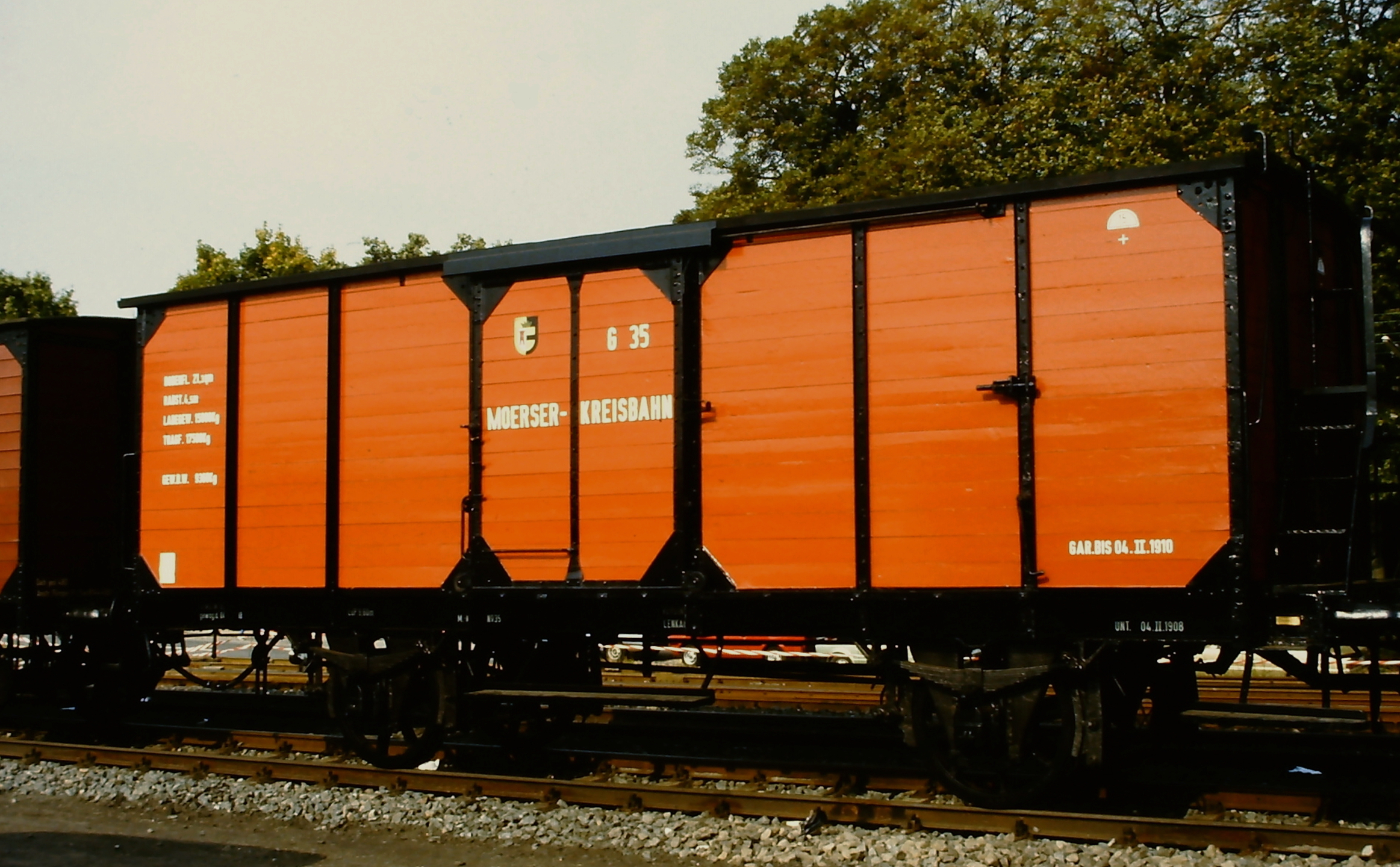 Geschlossener Güterwaggon der Moerser Kreisbahn, ausgestellt auf der Fahrzeugschau 150 Jahre deutsche Eisenbahn in Bochum-Dahlhausen.